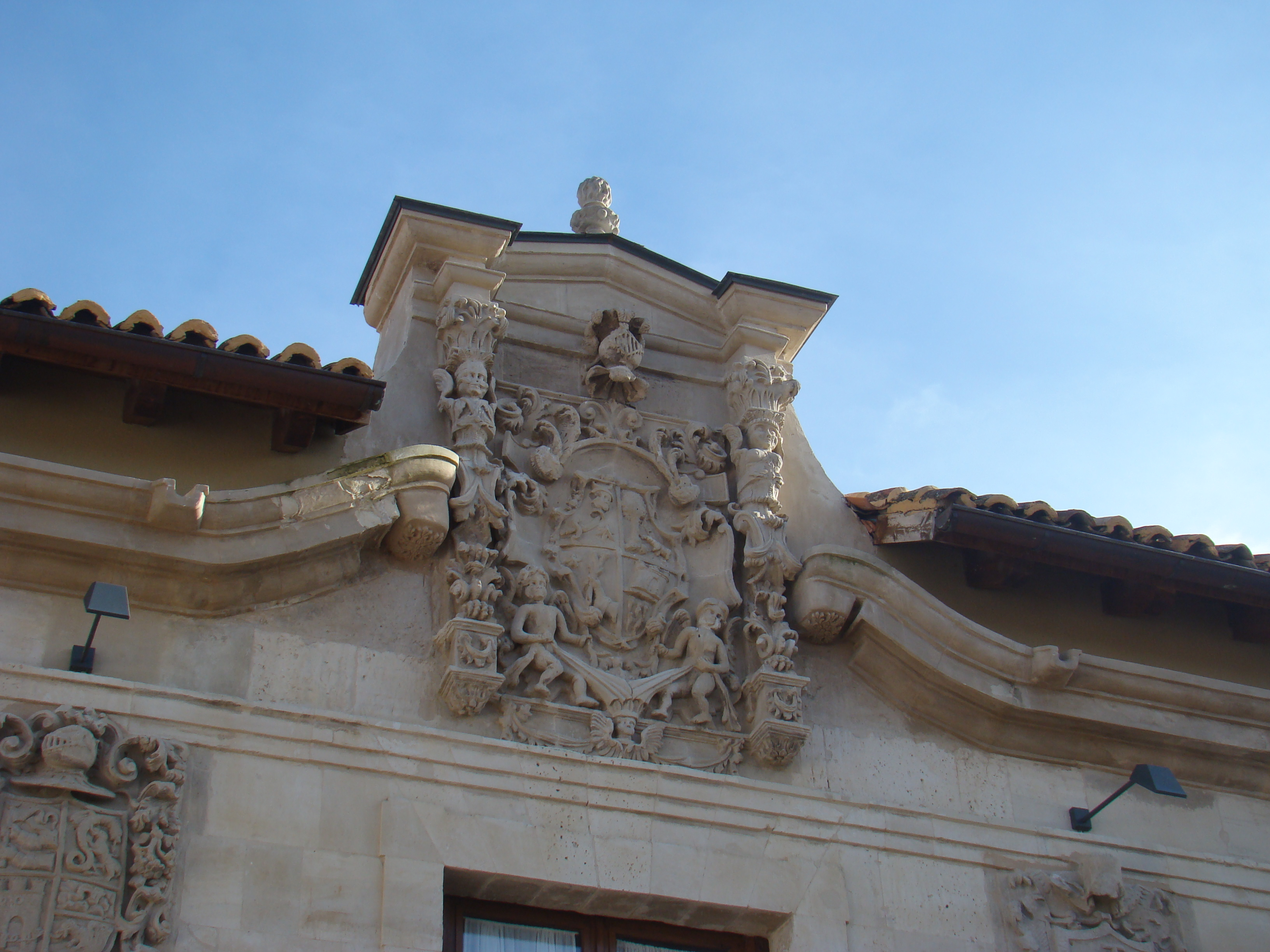 Valoria la Buena (Valladolid, España). Fachada del palacio de los Vizcondes de Valoria la Buena.